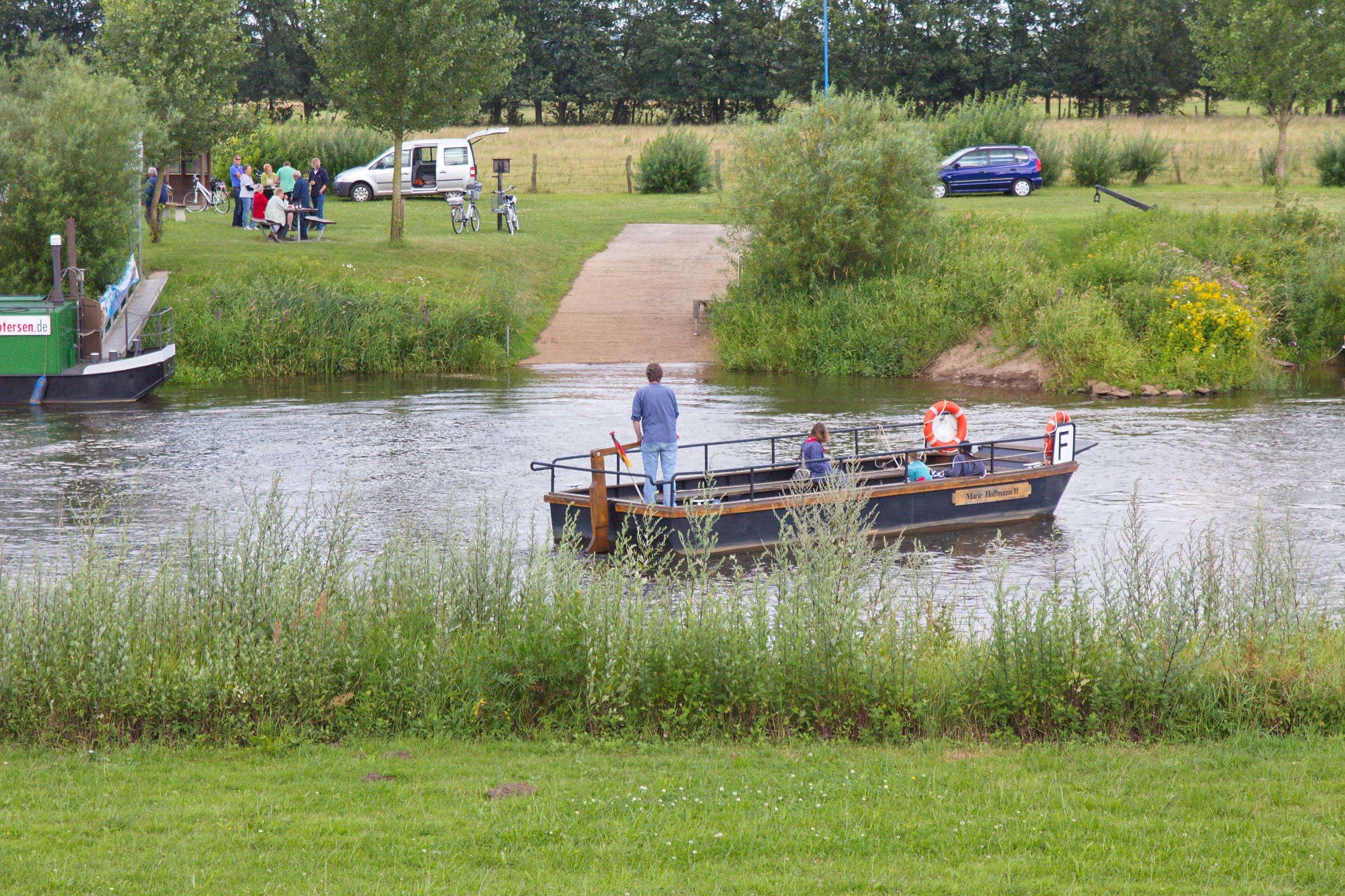 Allerfähre in Westen (Dörverden), Niedersachsen, Deutschland.